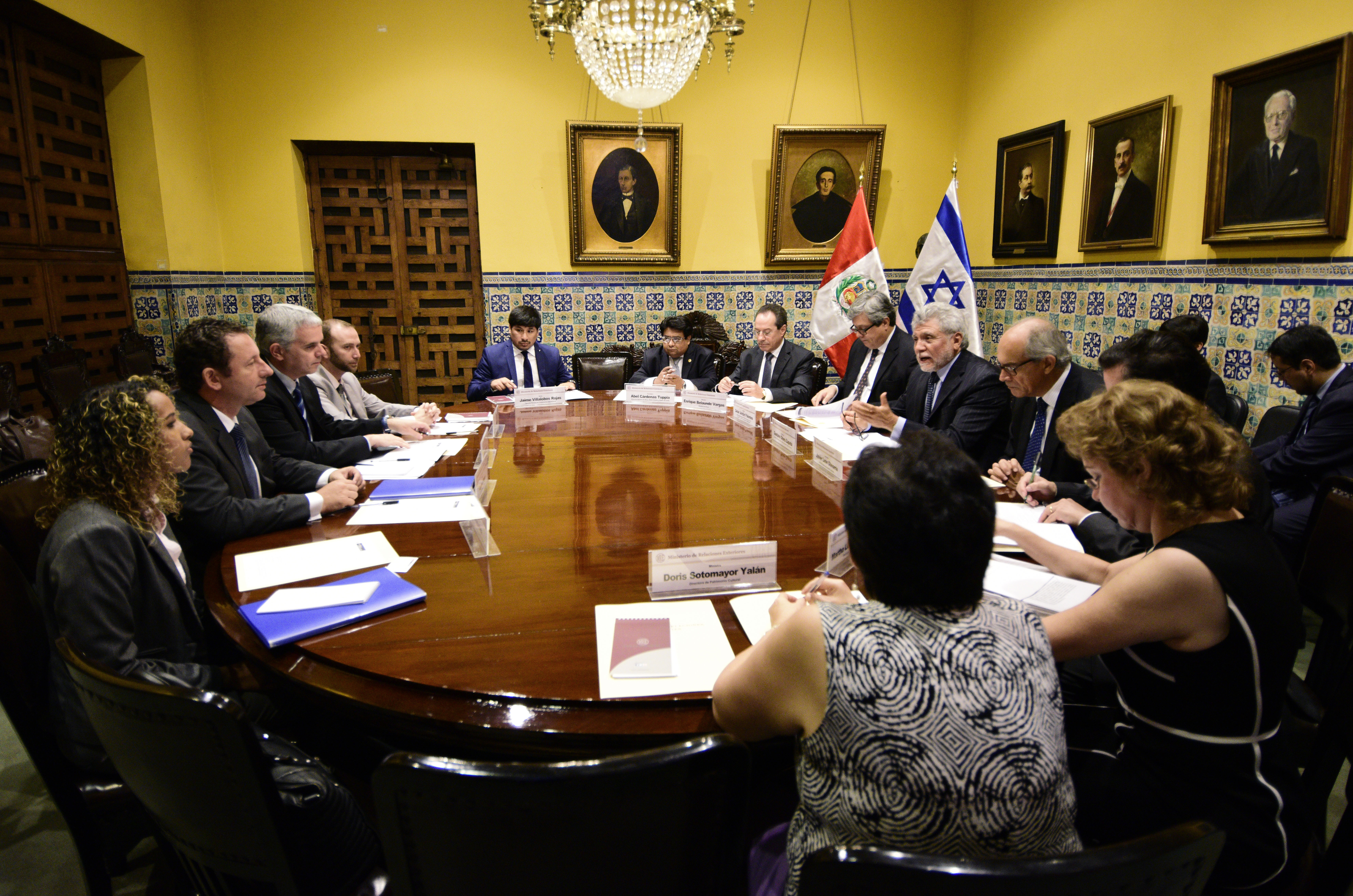 En la sede del Ministerio de Relaciones Exteriores, el Director General de África, Medio Oriente y Países del Golfo, Embajador Gustavo Otero, junto al Director General Adjunto para América Latina y el Caribe de Israel, Modi Ephraim, sostuvieron la V Reunión del Mecanismo de Consultas Políticas entre el Perú e Israel.